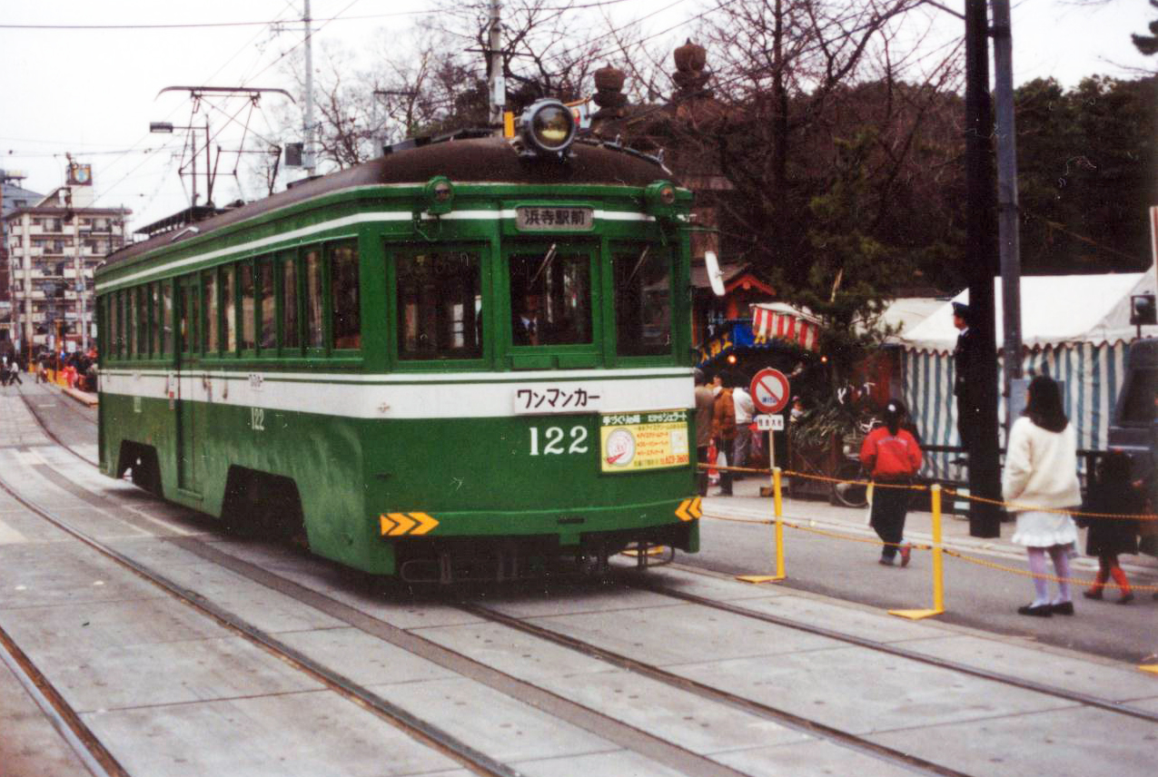 新標準色の１２１号。広告塗装になる事が多かったので、この塗装を纏った時期は短かった。